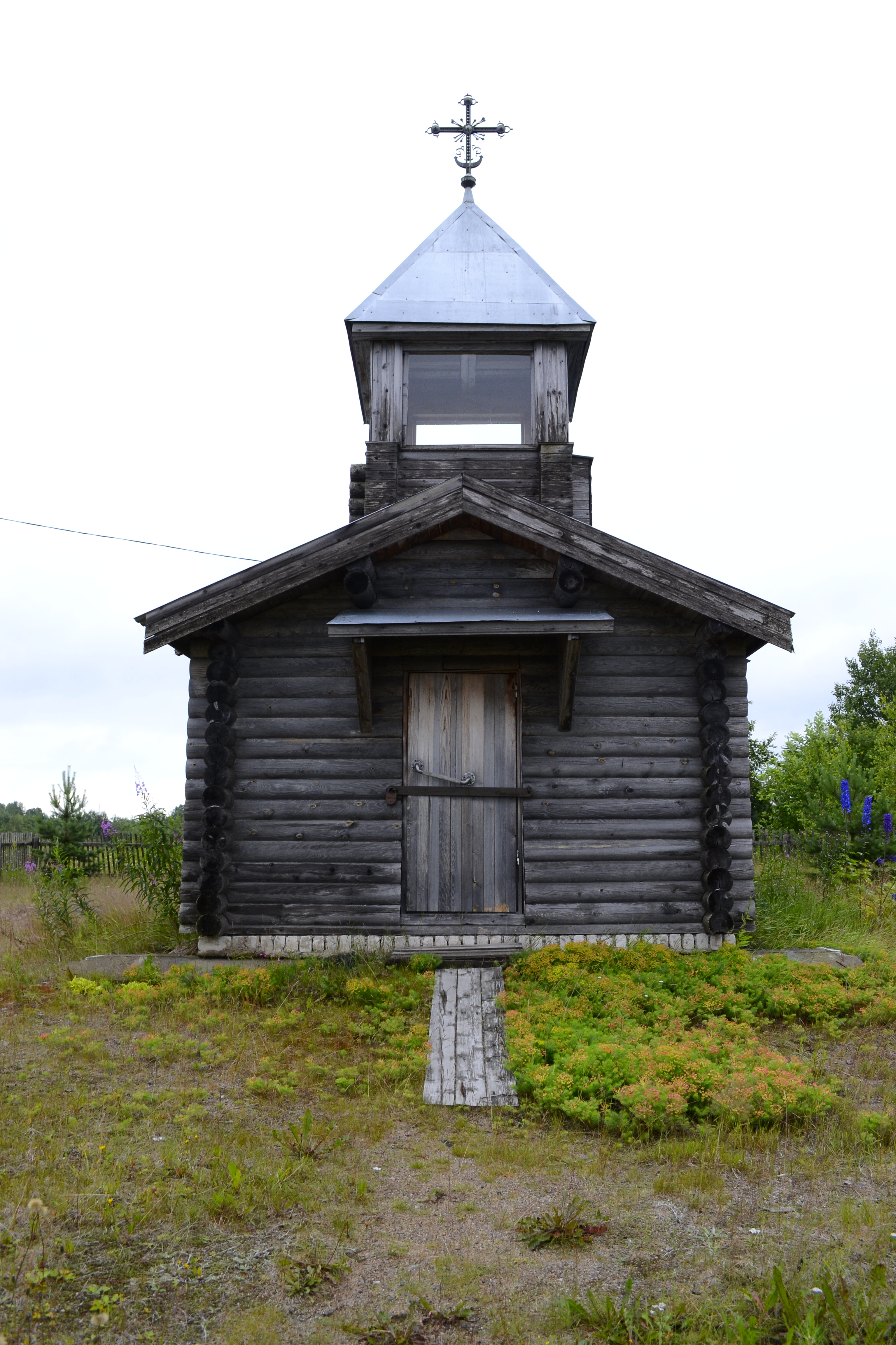 Kuujärve tsässona